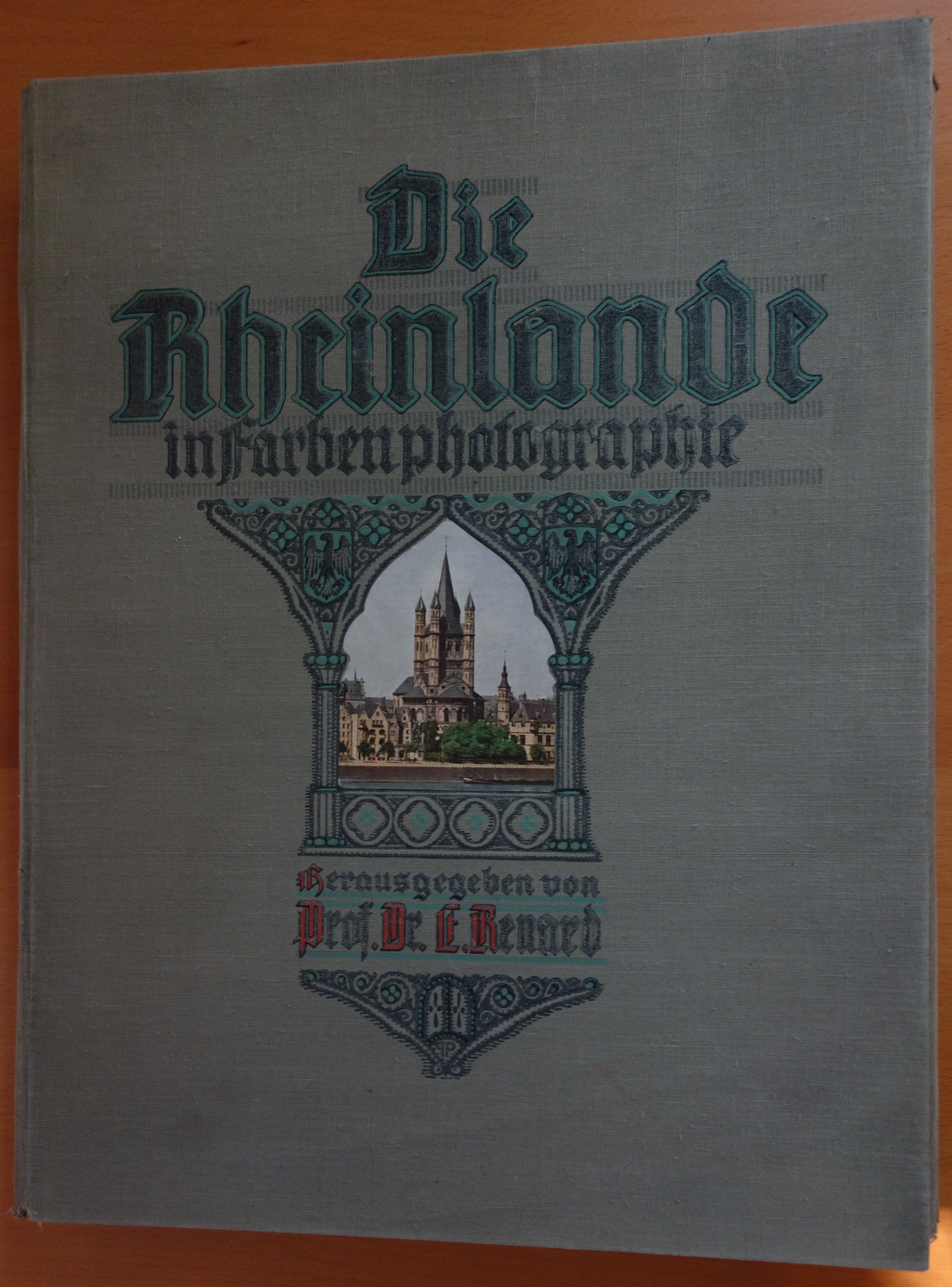 Die Rheinlande von Edmund Renard